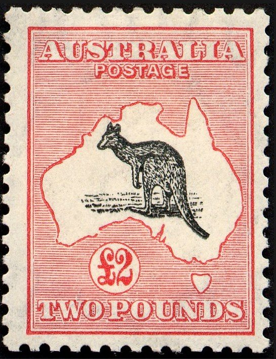 Australia stamp 1913 2 pound kangaroo